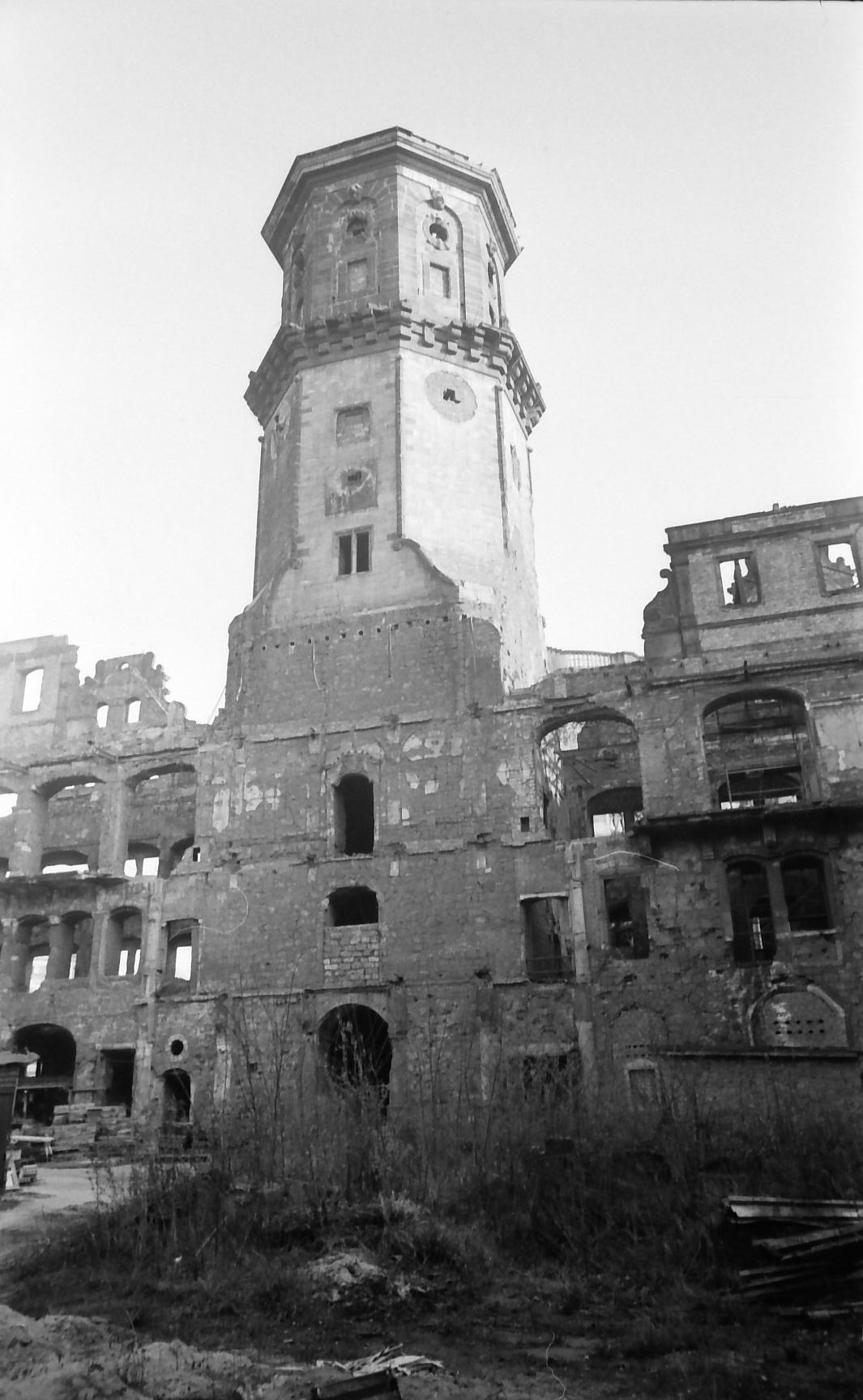 Mai 1984: Ruine des Dresdner Schlosses (Schloßturm vom Großen Schloßhof aus gesehen)